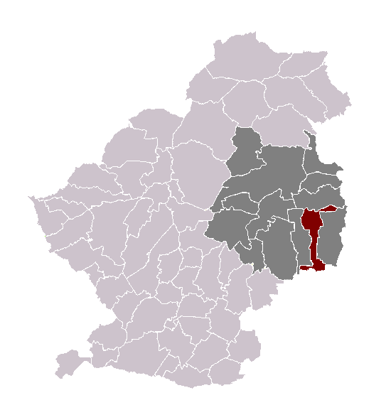 Erre-en-Ostrevent dans son canton et son arrondissement